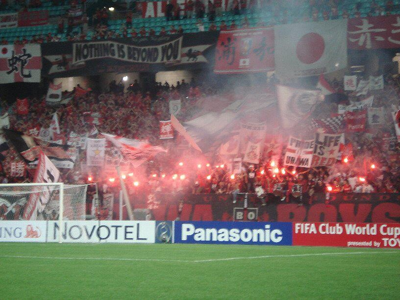 韓国にて発煙筒を炊くサポーター